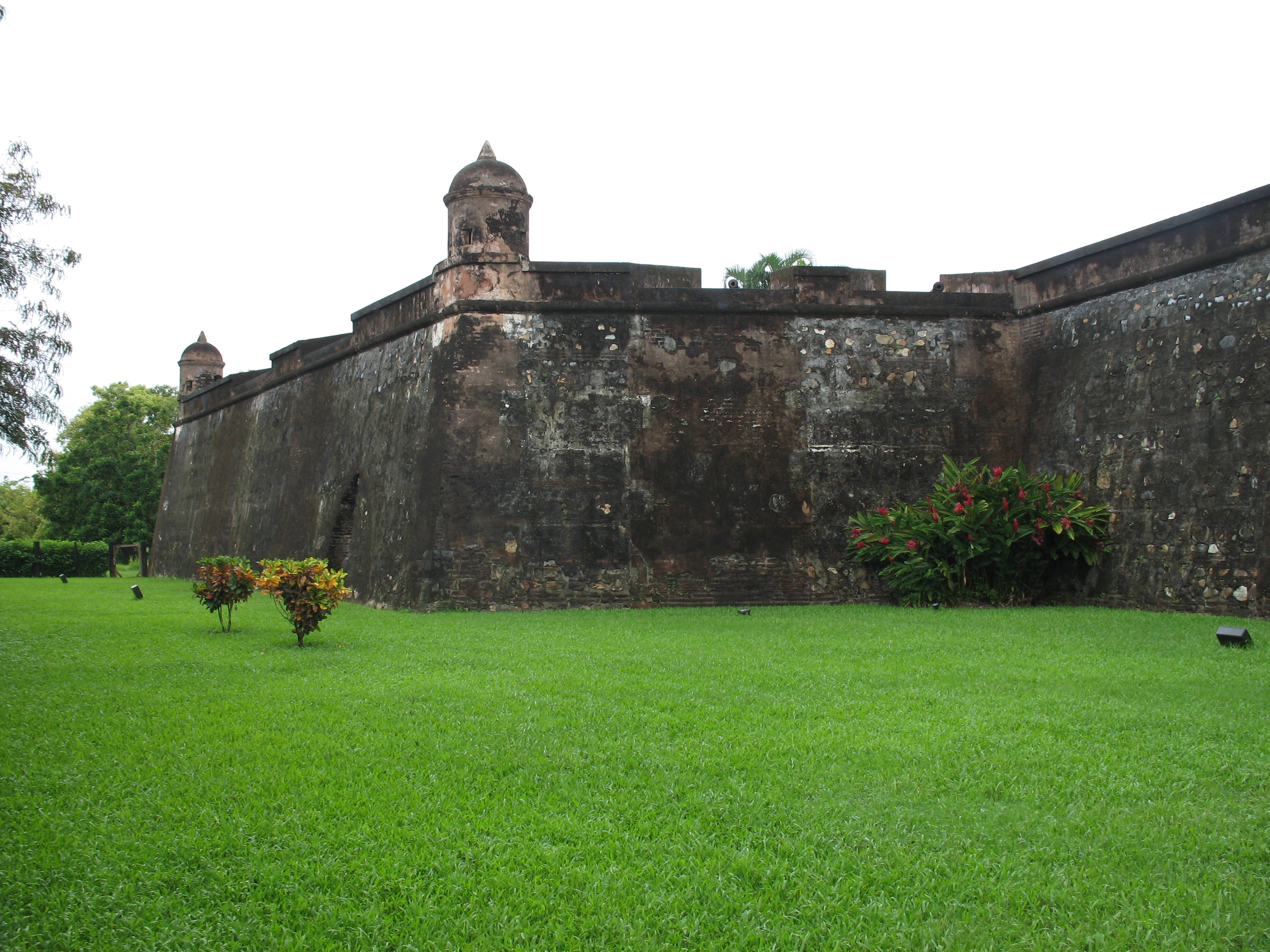 Vista Exterior del Fuerte de Omoa - Honduras. Fotografia por : Dennis Garcia.